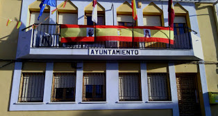 ayuntamiento zarza de tajo